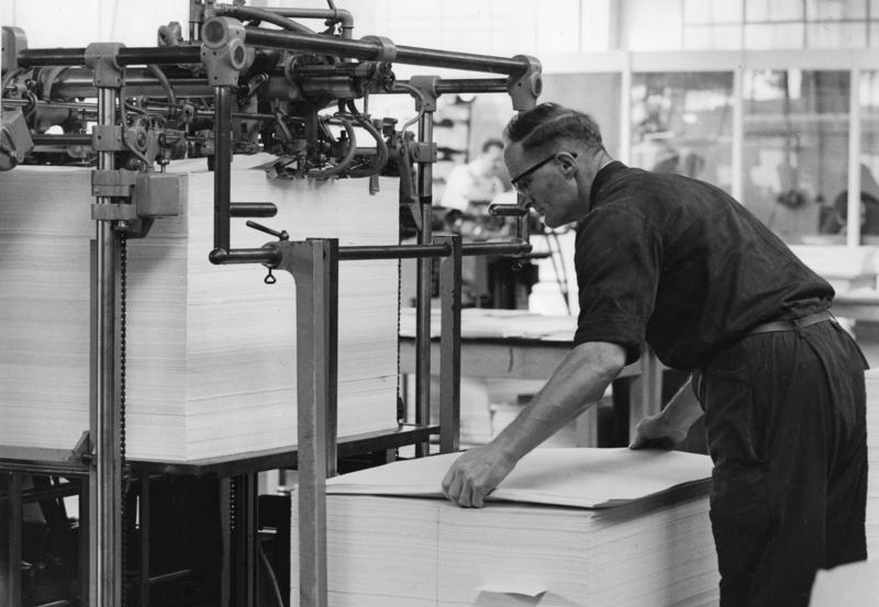 Firma Rheindruck in Boppard/Rheinland (Flüchtlingsbetrieb) Vorstapeln einer Zweifarben-Offsetmaschine